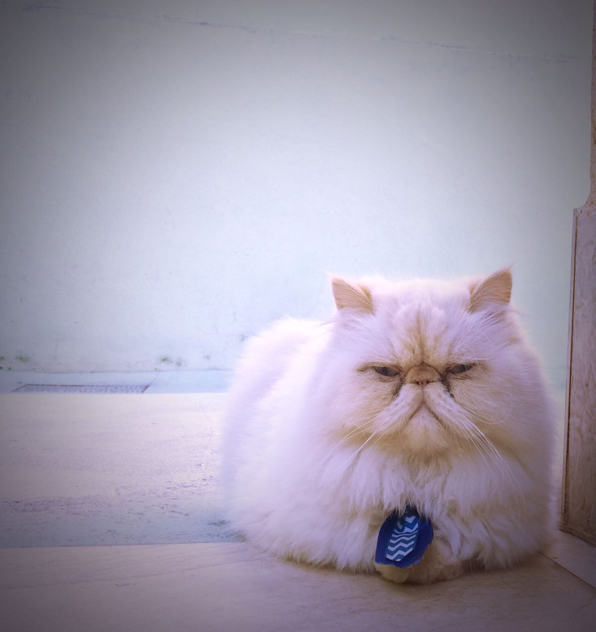 Gato Himalaio Idade: 4 anos